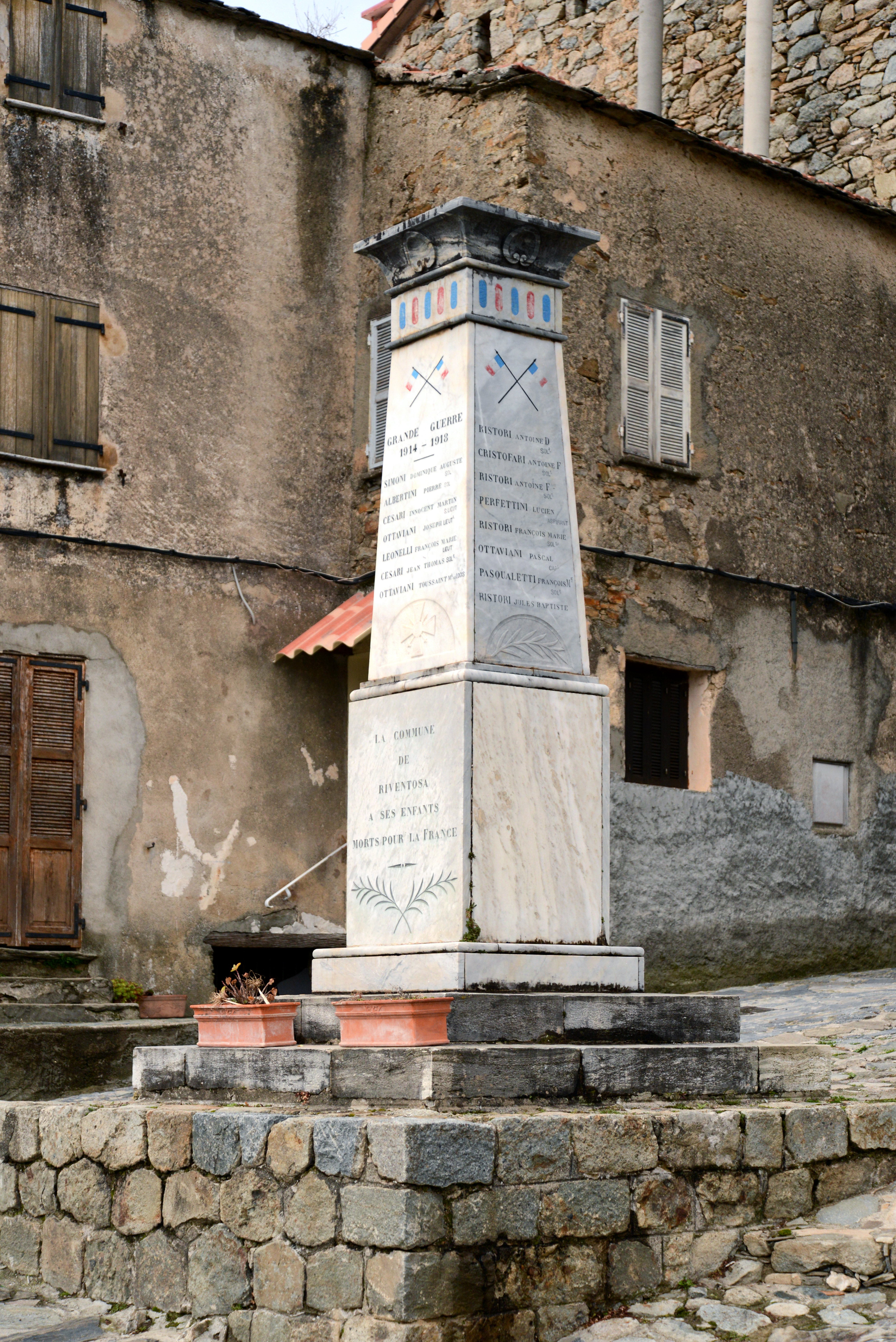 Riventosa, Centre Corse - Monument aux morts, Piazza Curnachjola U Corsu